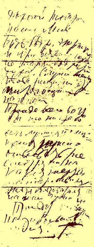 Записка Георгия Гапона Н. М. Варнашёву, написанная на станции Вержболово 23 ноября 1905 года: «Дорогой товарищ Николай Михайлович. Будь бодр, энергичен и при всяких неудачах не теряй бодрости духа. Служи между товарищами примиряющим началом. Прежде всего во что бы то ни стало все лучшие помещения нужно отвоевать (несмотря ни на какие жертвы материальные). Нельзя пользоваться нашими — чужими. Привет товарищам. Не забывайте меня. Г.»